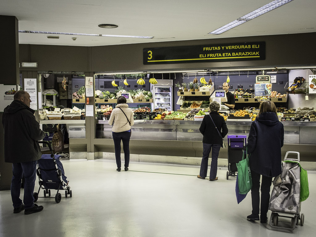 Iruñeko komertzioa COVID-19 pandemian. Irudi guztiak hemen